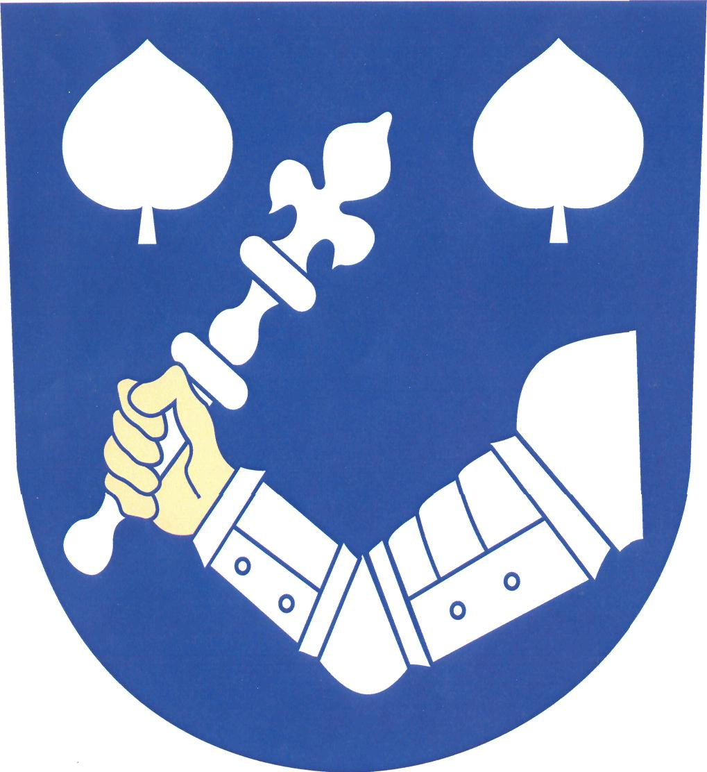 Znak obce Velké Petrovice